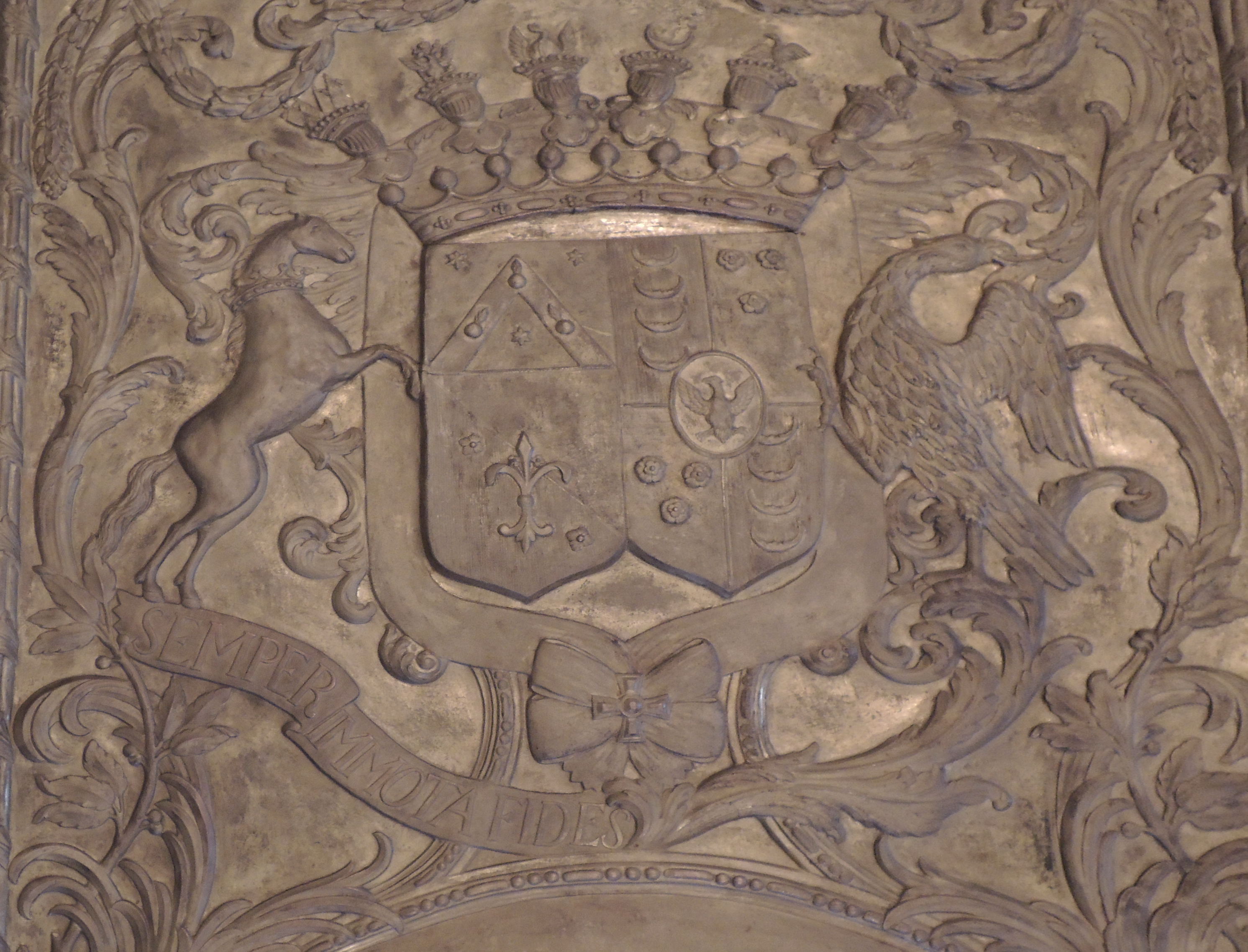 Воронцова Анна Карловна 07.12.1722-31.12.1775 Россия. Санкт-Петербург. Благовещенская усыпальница. Графиня, статс-дама, обер-гофмейстерина, жена графа Михаила Илларионовича Воронцова. Дочь старшего брата императрицы Екатерины I Карла Самойловича Скавронского, возведенного в 1727 г. в графское достоинство. Медная оковка (золоченая). Мастер И.Х. Праузенбергер, 1776 г. Перенесена из некрополя XVIII в. День рождения 7 декабря (по старому стилю). День памяти 31 декабря (по старому стилю).